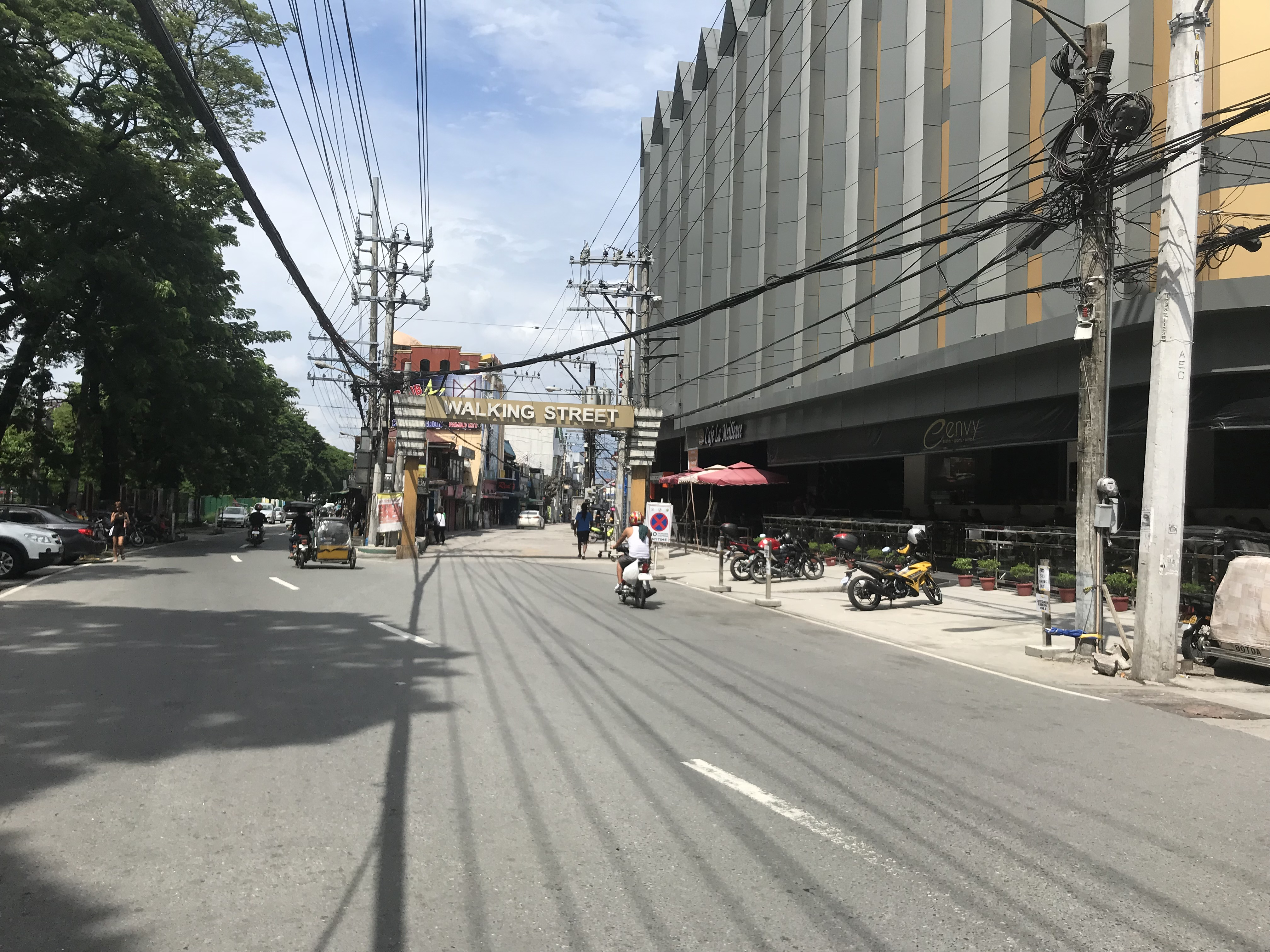 アンへレス市のウォーキングストリート入口。